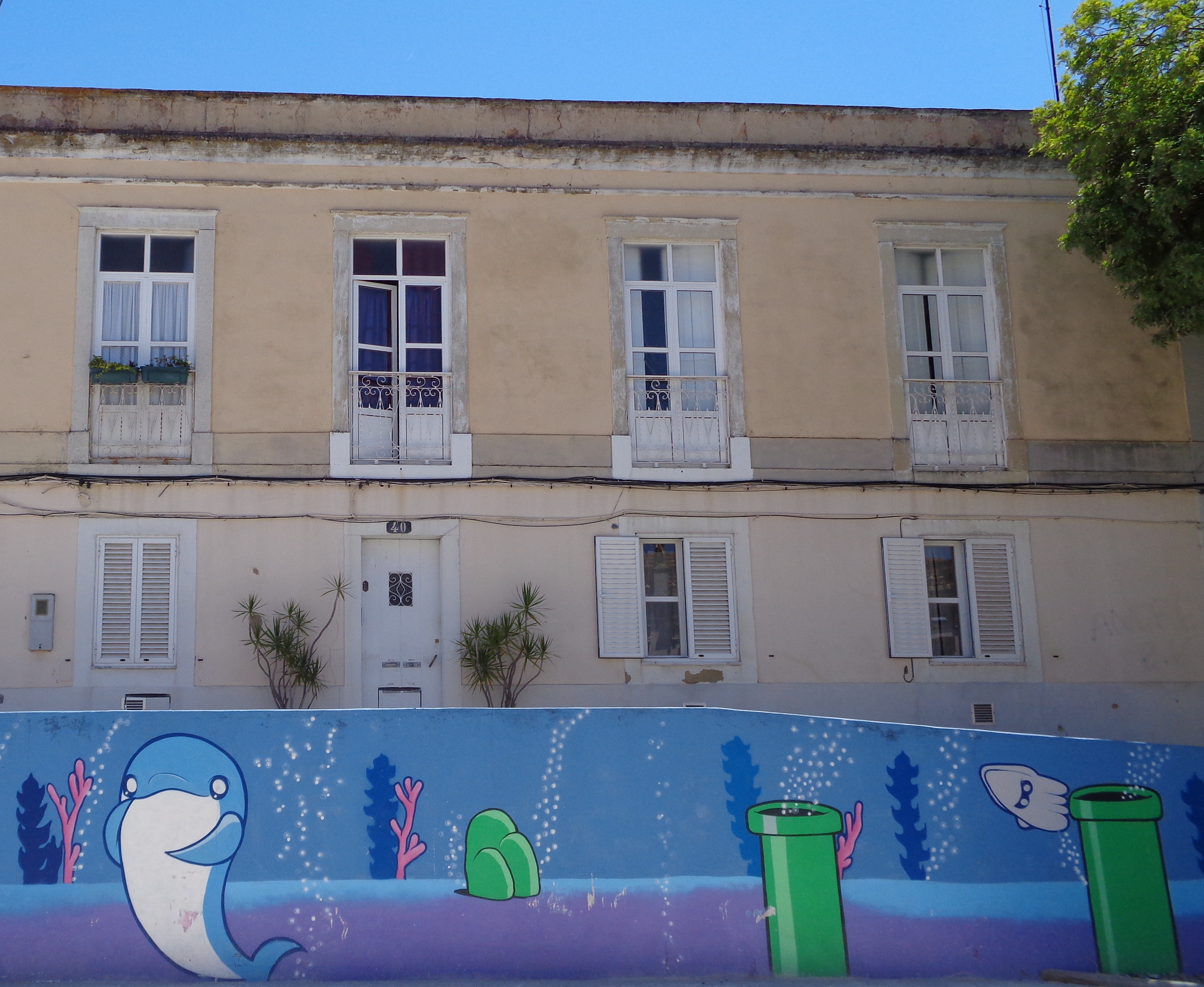 Casa do n.º 40 da Avenida Manuel Maria Portela em Setúbal onde viveu e faleceu Manuel Maria Portela